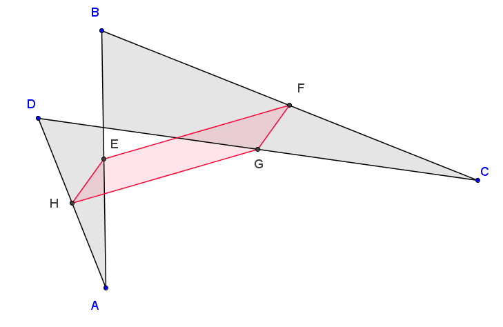 varignon parallelogram